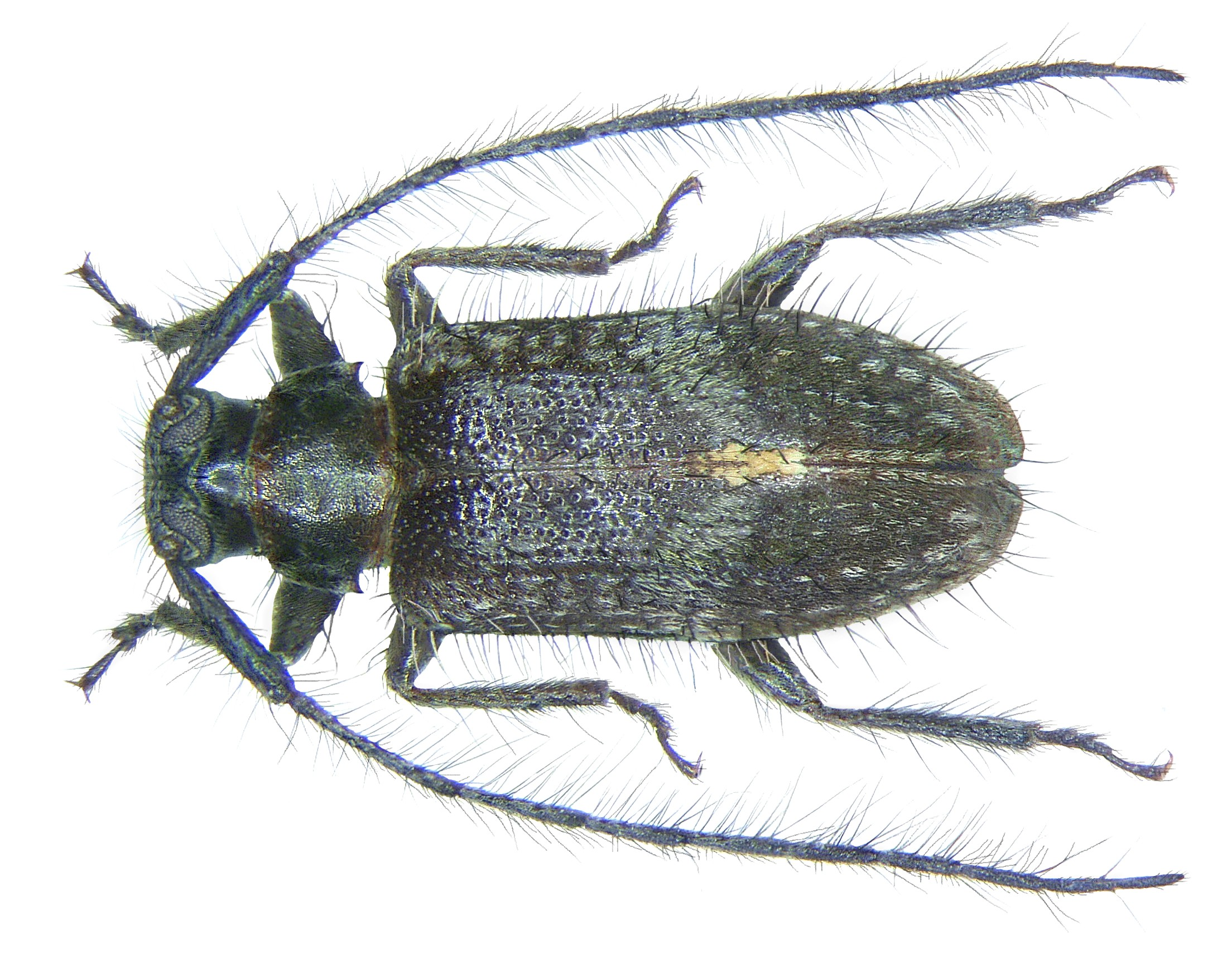 Familie: Cerambycidae Größe: 5,7 mm Fundort: Indien, Uttar Pradesh leg. A.Reidel, 1989; det. Holzschuh, 2001 Foto: U.Schmidt, 2008